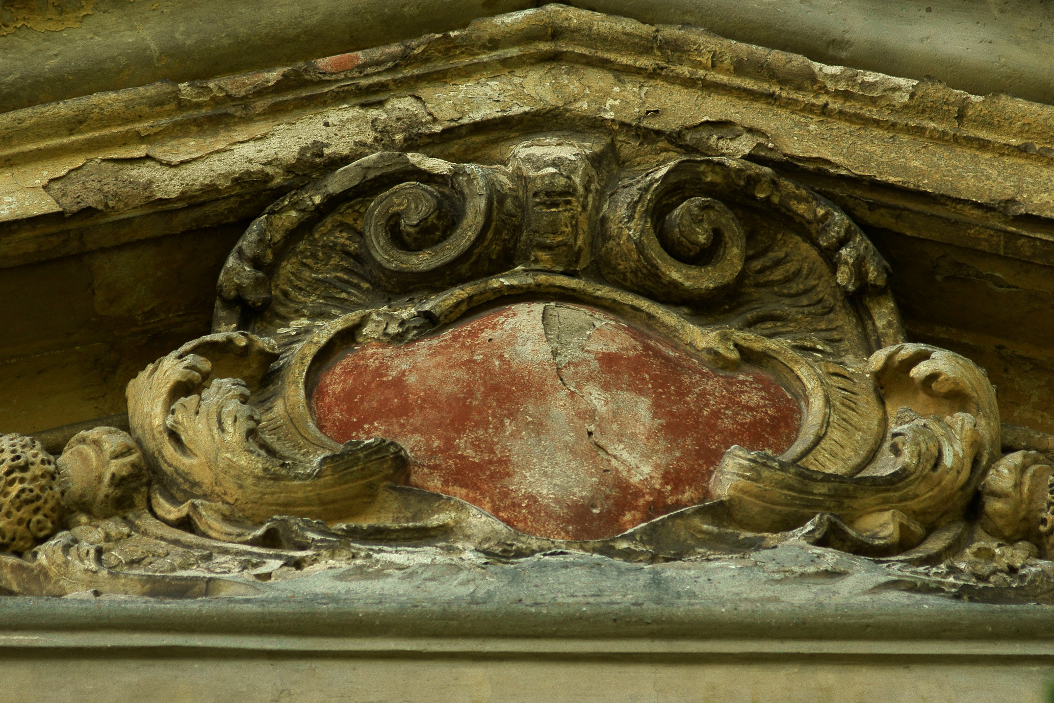 Parchów - pałac w ruinie (zabytek nr A/3221/956 z dn. 4.10.1961)